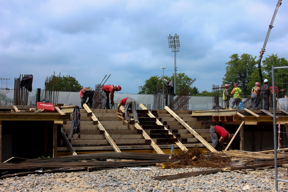 Строежът на новия сектор "В" на "Лудогорец Арена" в Разград